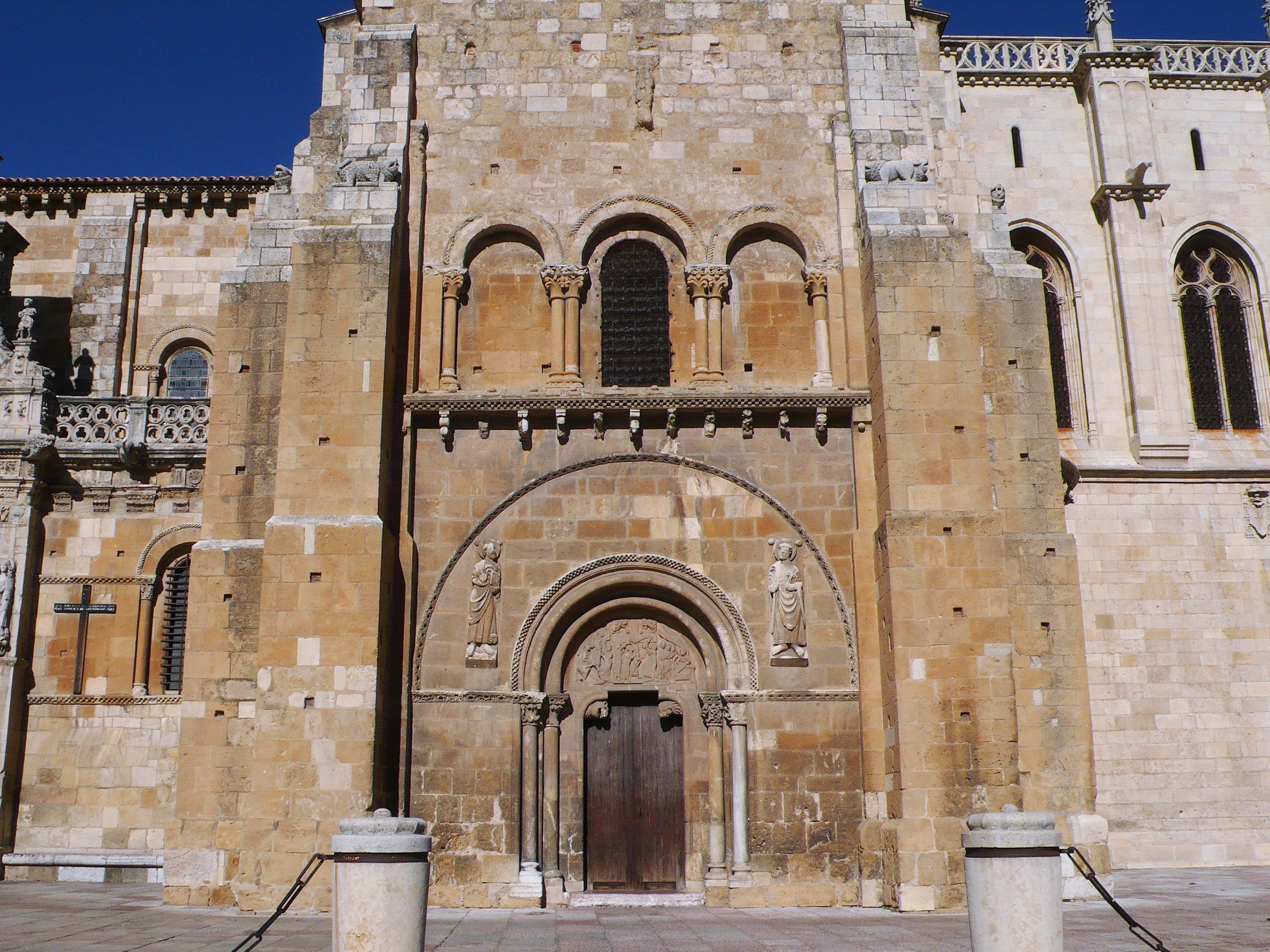 Colegiata de San Isidoro. En el tímpano, El Descendimiento, la Ascención y la Resurrección de Cristo, ¿obra del taller del maestro Mateo?, ¿o trabajo del maestro Esteban?